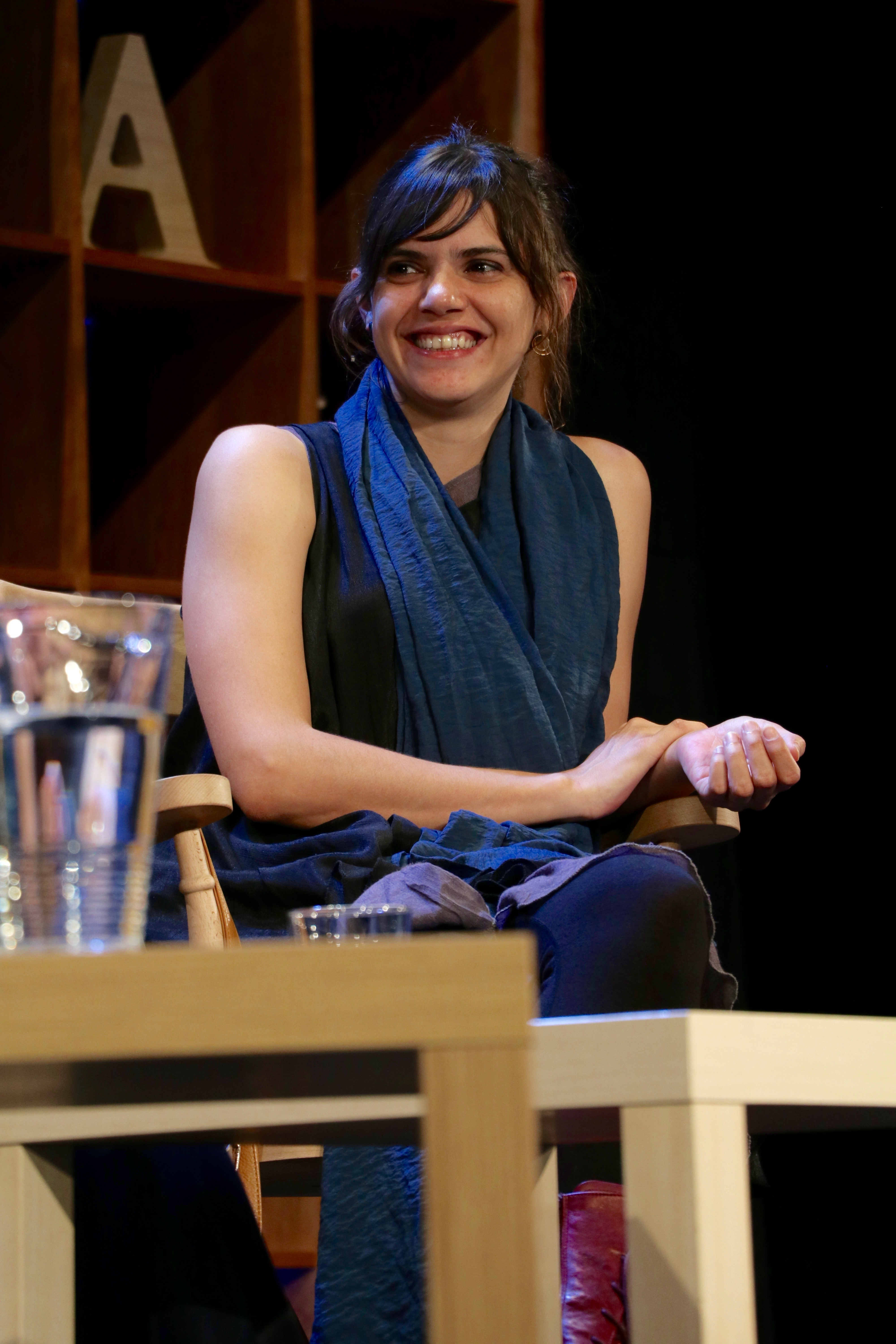 Hay Festival 2016 - Valeria Luiselli